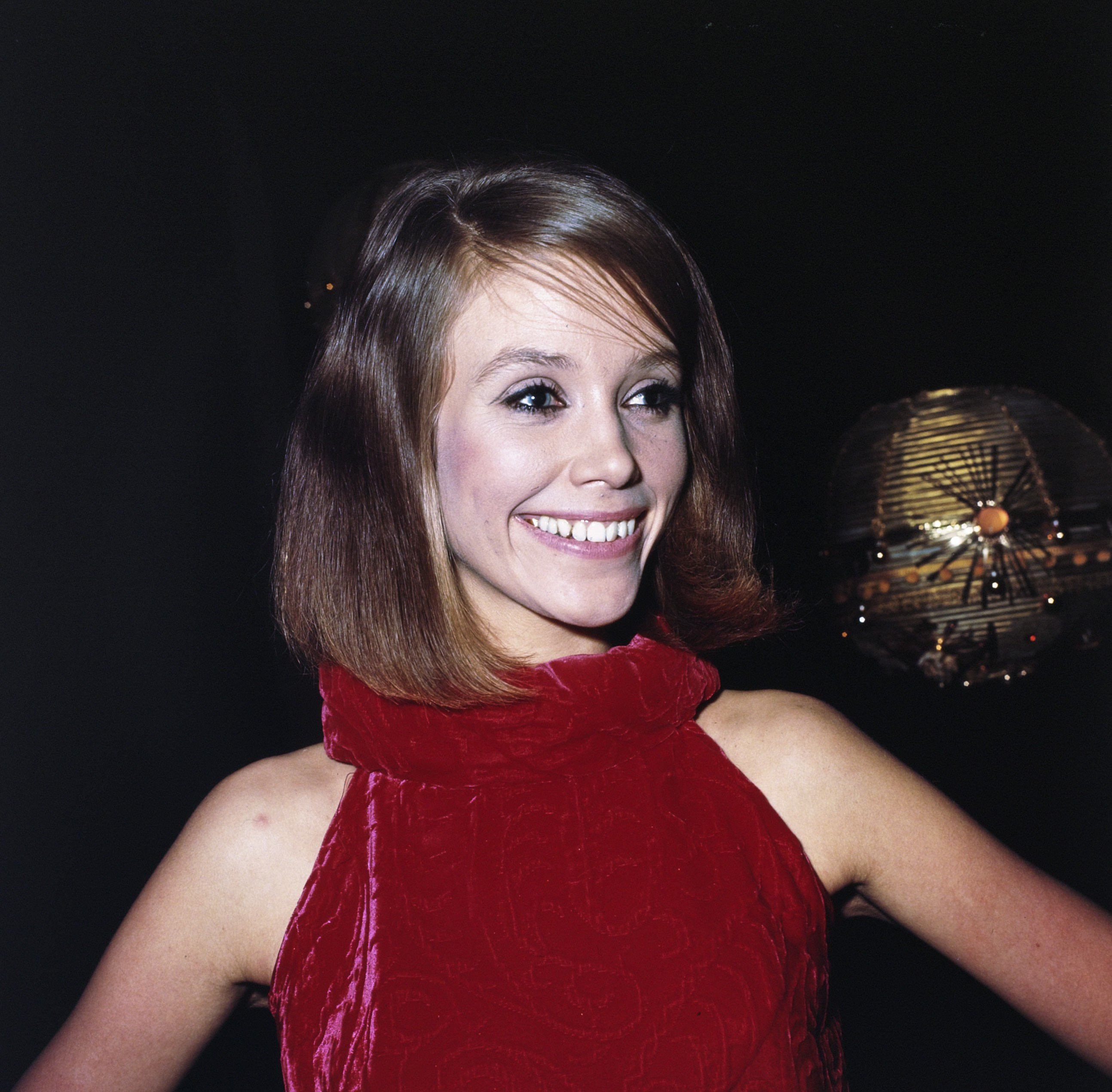 Loesje Hamel: lid van cabaretgroep Shaffy Chantant. Meisjesnaam Loes Blokker (1938-1974). Oorspronkelijk fotomodel en mannequin. Trad ook op in het legendarische tv-programma "Zo is het toevallig ook nog eens een keer"